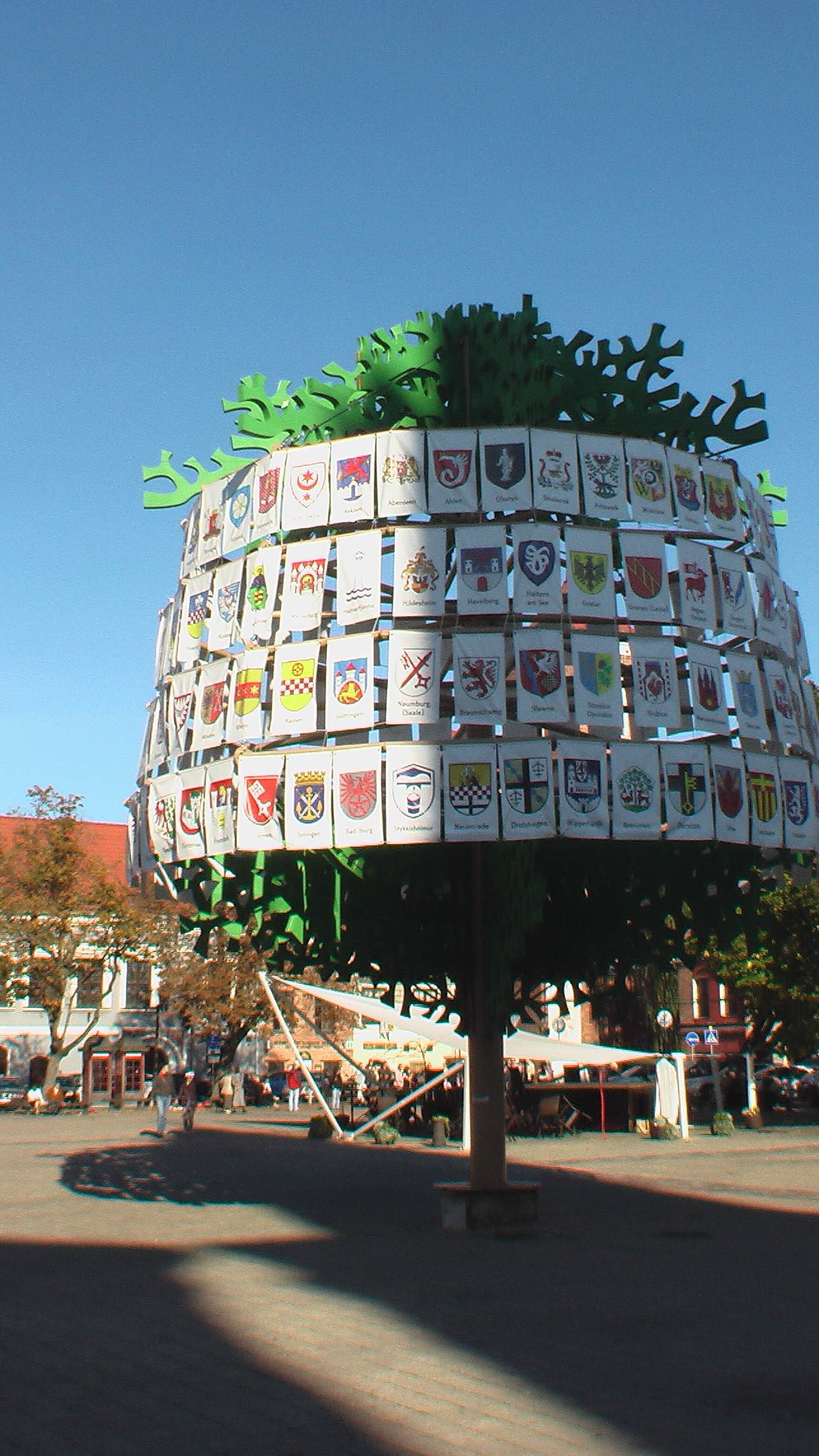 Partnerstädte-Baum in Kaunas.